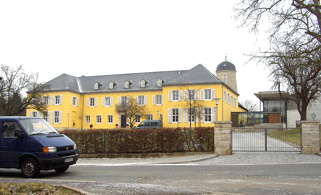 Villa des Gauleiters.